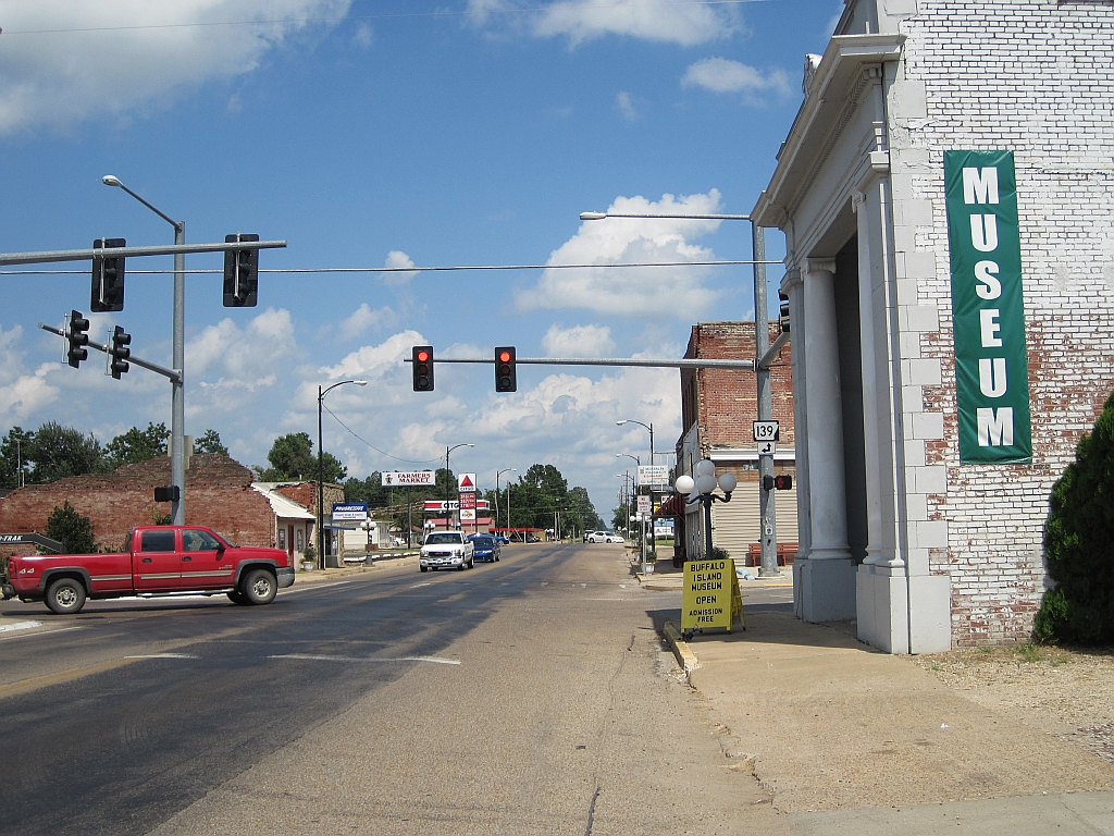 Monette, Arkansas